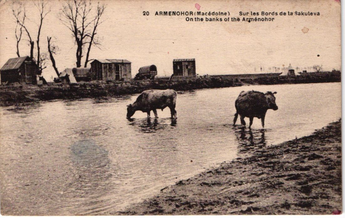 Сакуева при Арменово.